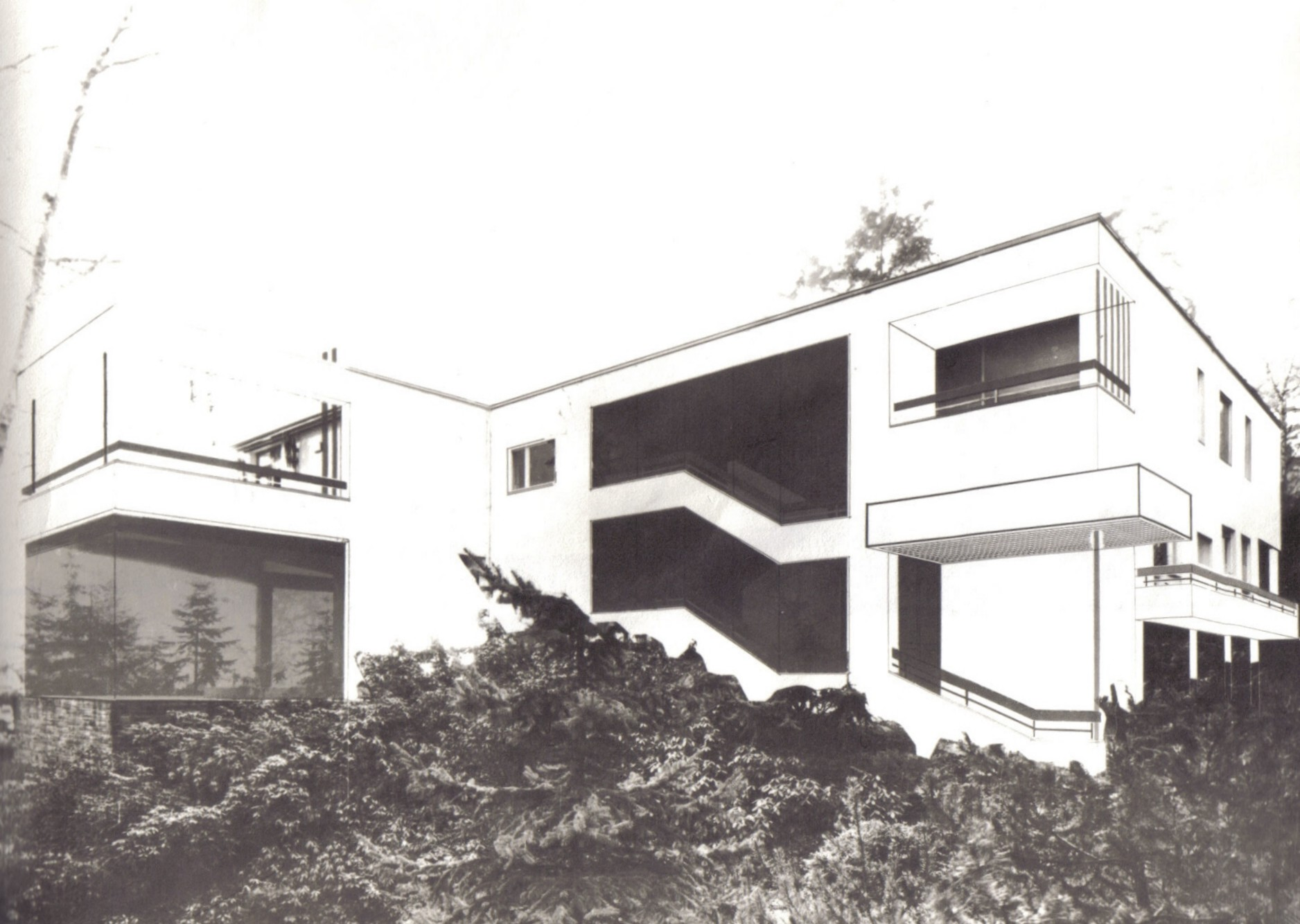 Ehemalige Residenz der Botschaft der Tschechischen und Slowakischen Föderativen Republik, Am Buchenhang 5, Kessenich, Bonn Rezidencie ČSSR v Bonne (1975—1976)